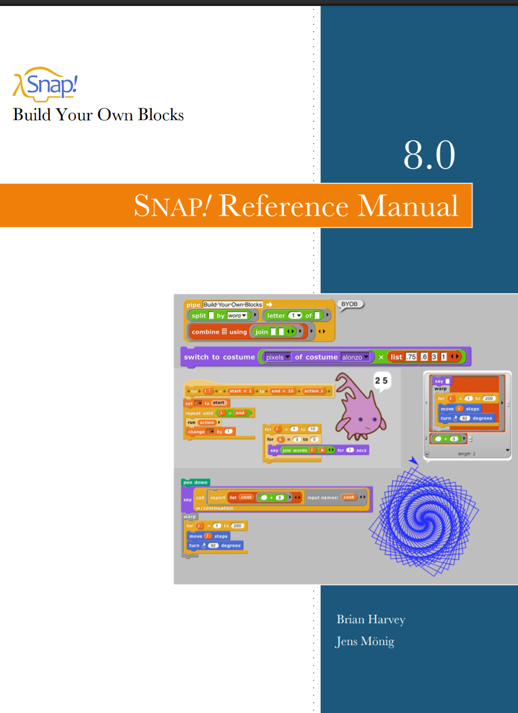 Snap Handbuch Titelbild